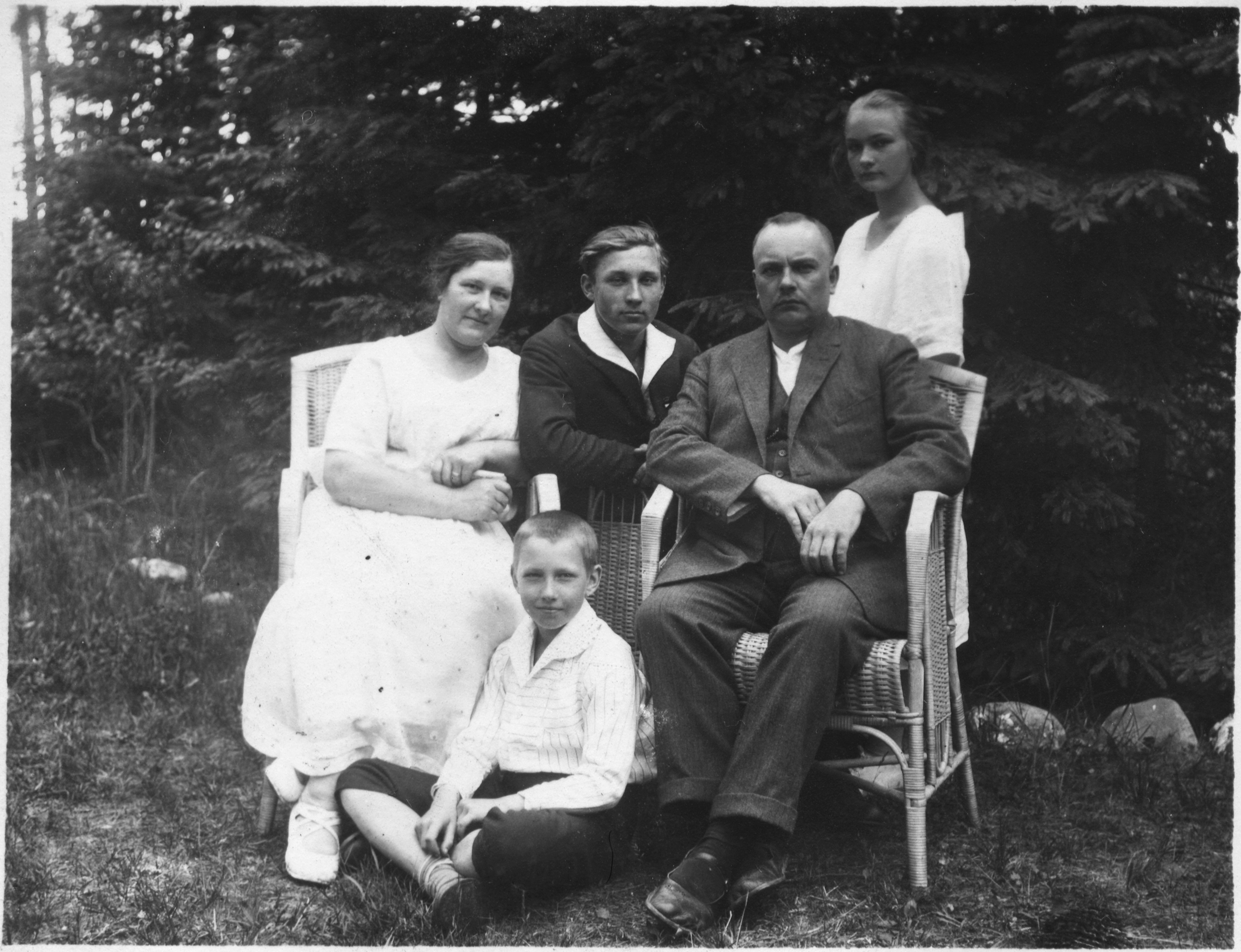 Jaan koos perega Karepal.